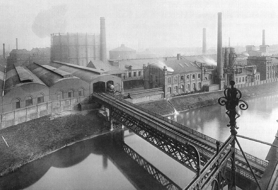 Gaswerke Glocksee in Hannover, mit Eisenbahnbrücke über die Ihme. In dem Buch von Olaf Grohmann (s.u.) ist diese Brücke auf Seite 87 im Text erwähnt, auf Seite 98 abgebildet und auf Seite 181 in einem Plan von 1927 eingezeichnet. In dem Buch von Walter Buschmann Linden ist die Brücke im Faltplan von 1875 nicht vorhanden, aber im Faltplan von 1892.